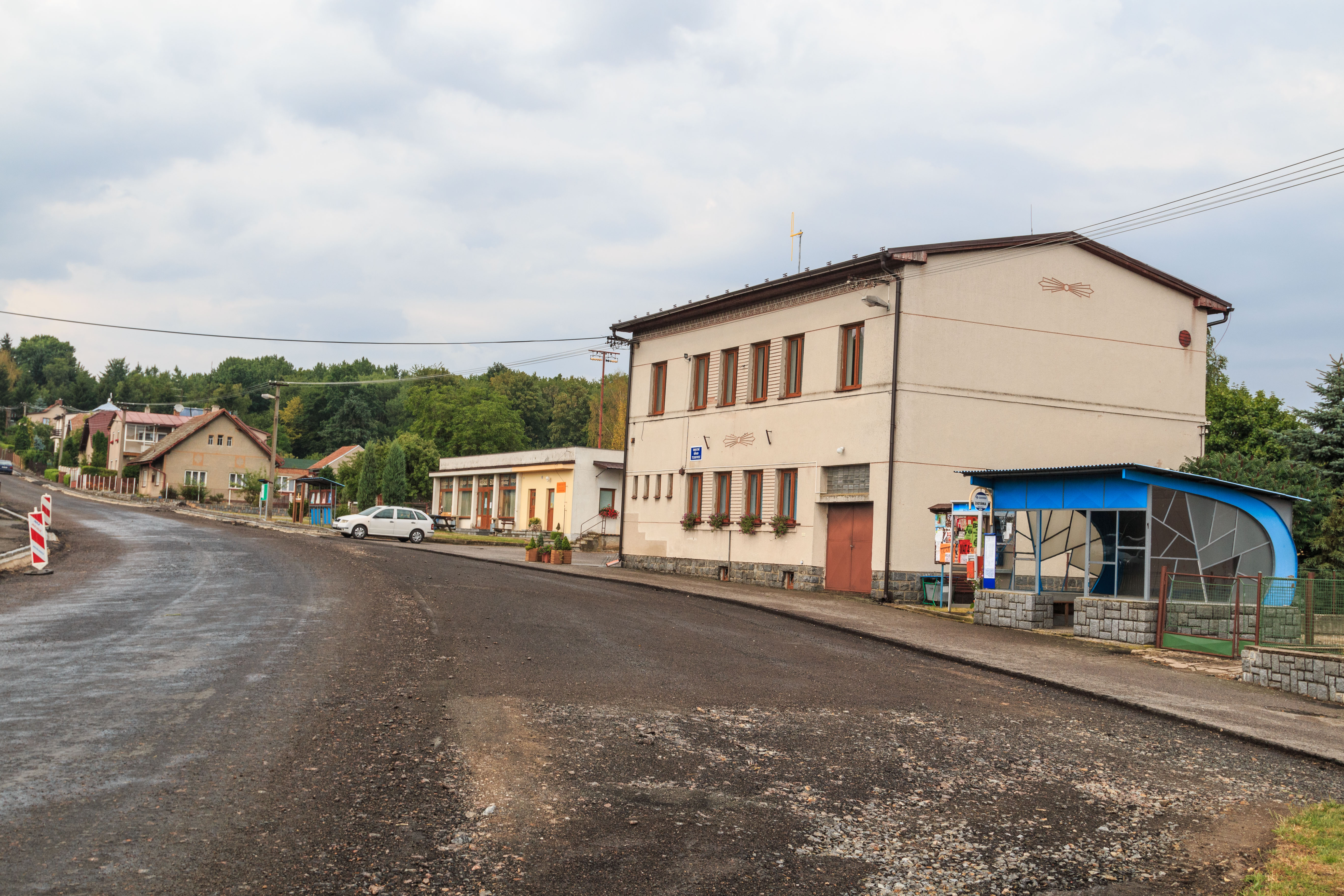 Dřeveš obecní úřad